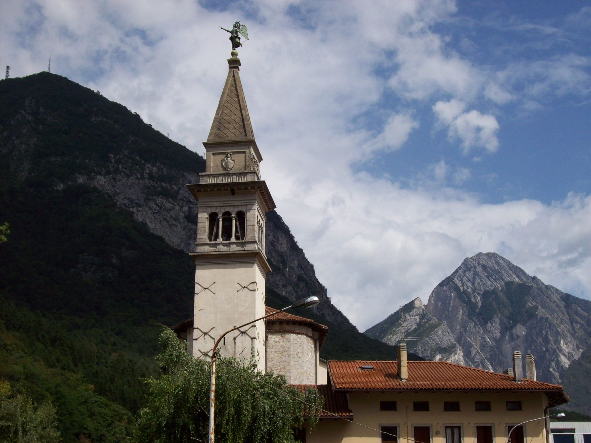 Tolmezzo (UD), particolare del campanile del Duomo di San Martino